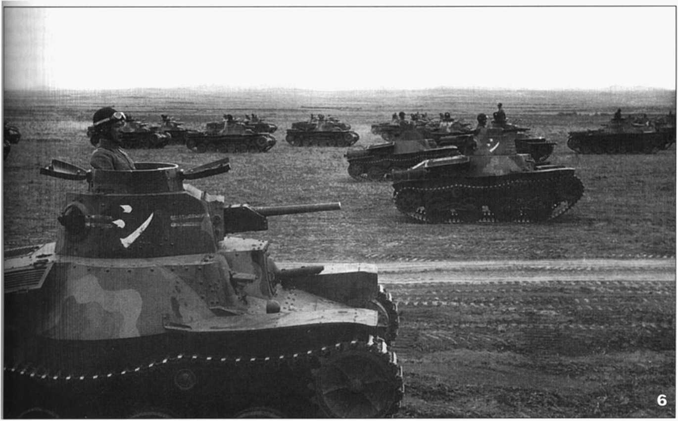 1944年滿洲的關東軍九五式戰車隊